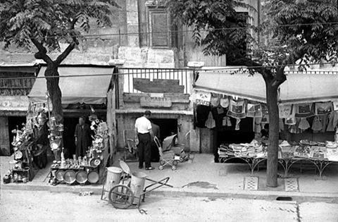 Les covetes al llarg del temps